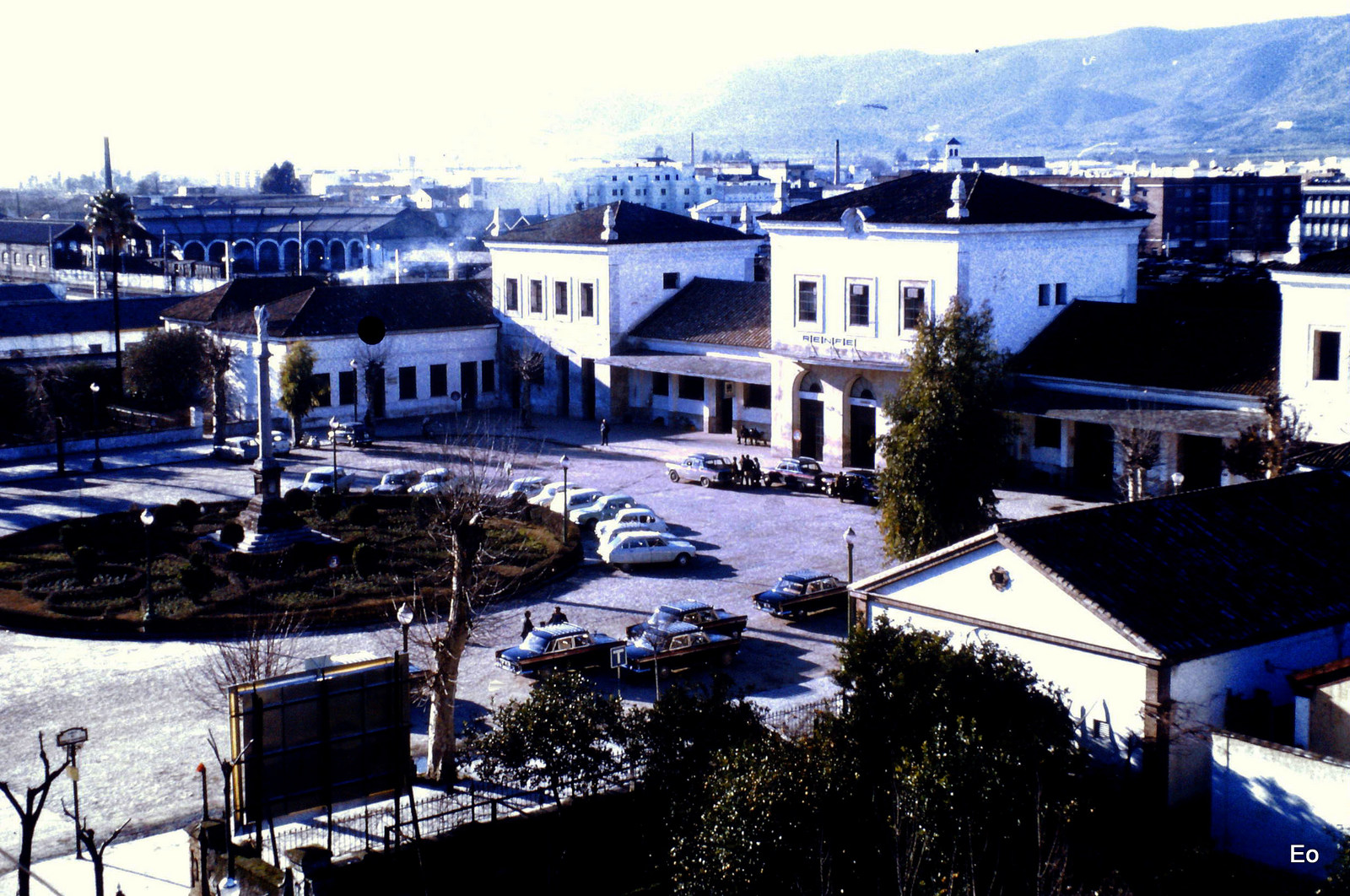 Fachada de la antigua estación de Córdoba. Puede verse al fondo, a la izquierda, las cocheras del antiguo depósito de máquinas.